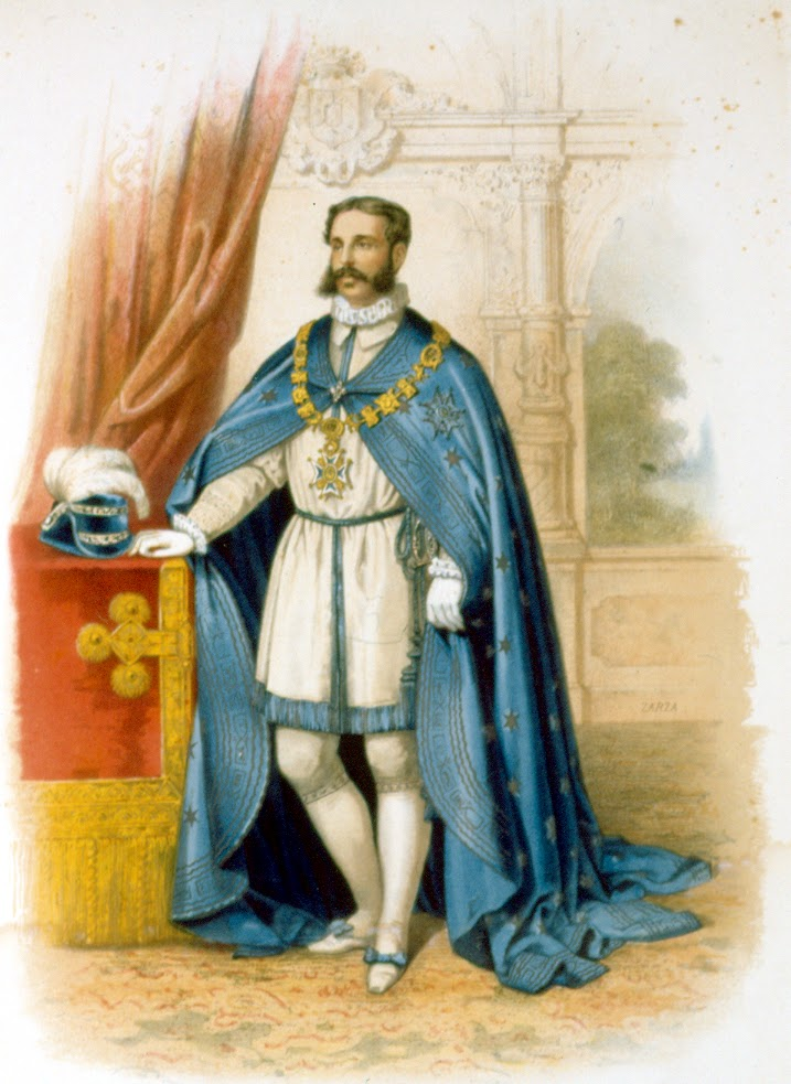 Litografía en color del siglo XIX que representa a José Osorio y Silva-Bazán (1825-1909), duque de Sesto y Alburquerque y marqués de Alcañices, con el traje ceremonial de la Orden de Carlos III. La litografía procede del libro Historia de las Órdenes de Caballería y de las condecoraciones Españolas, escrito por José Gil de Dorregaray y Antonio Benavides Fernández de Navarrete y publicado en 1864.